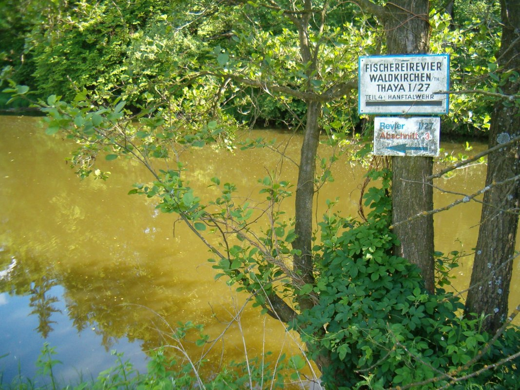 Rakouská Dyje na soutoku se Slavonickým potokem